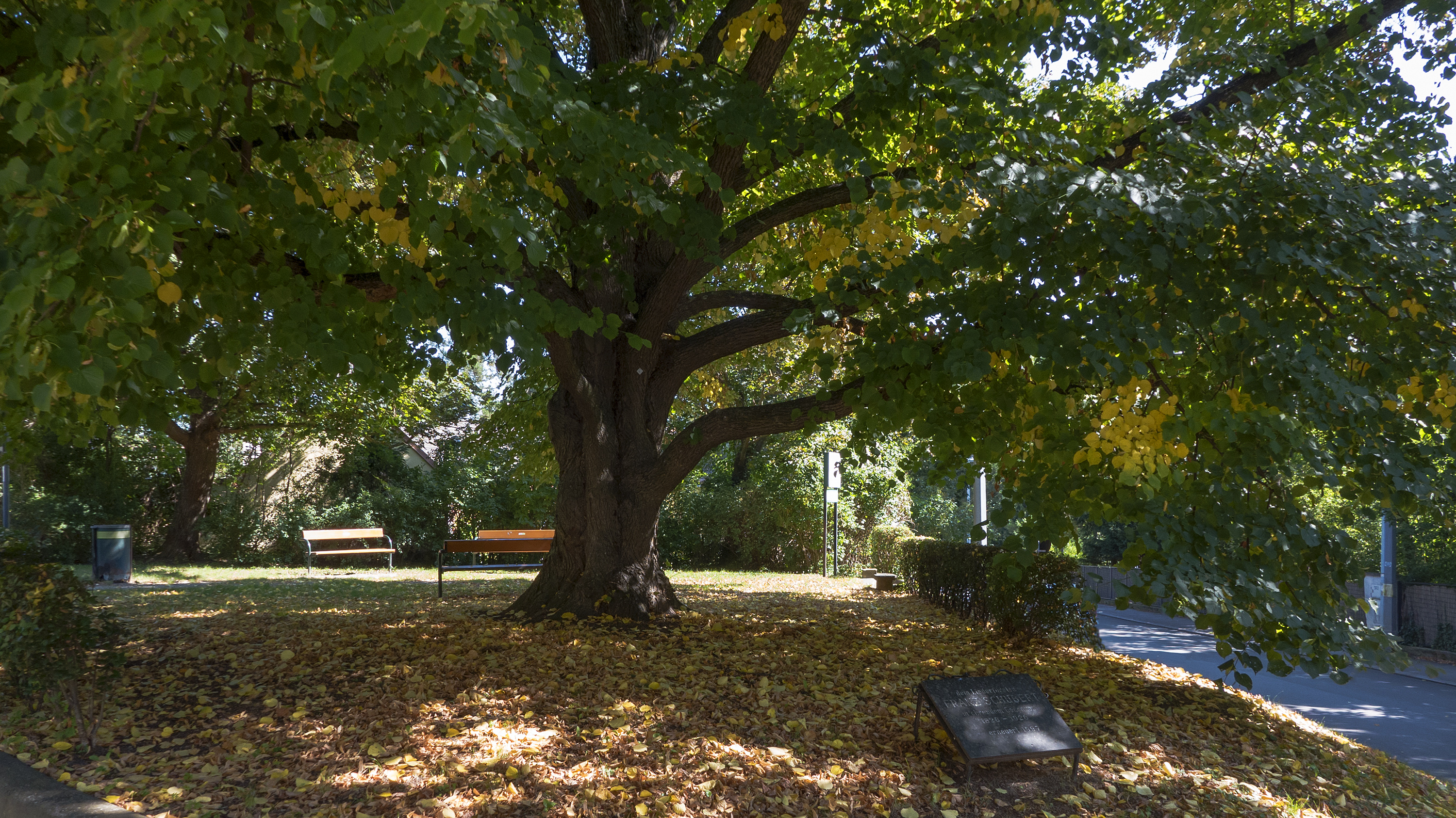 Maurer Schubertpark in Wien 23